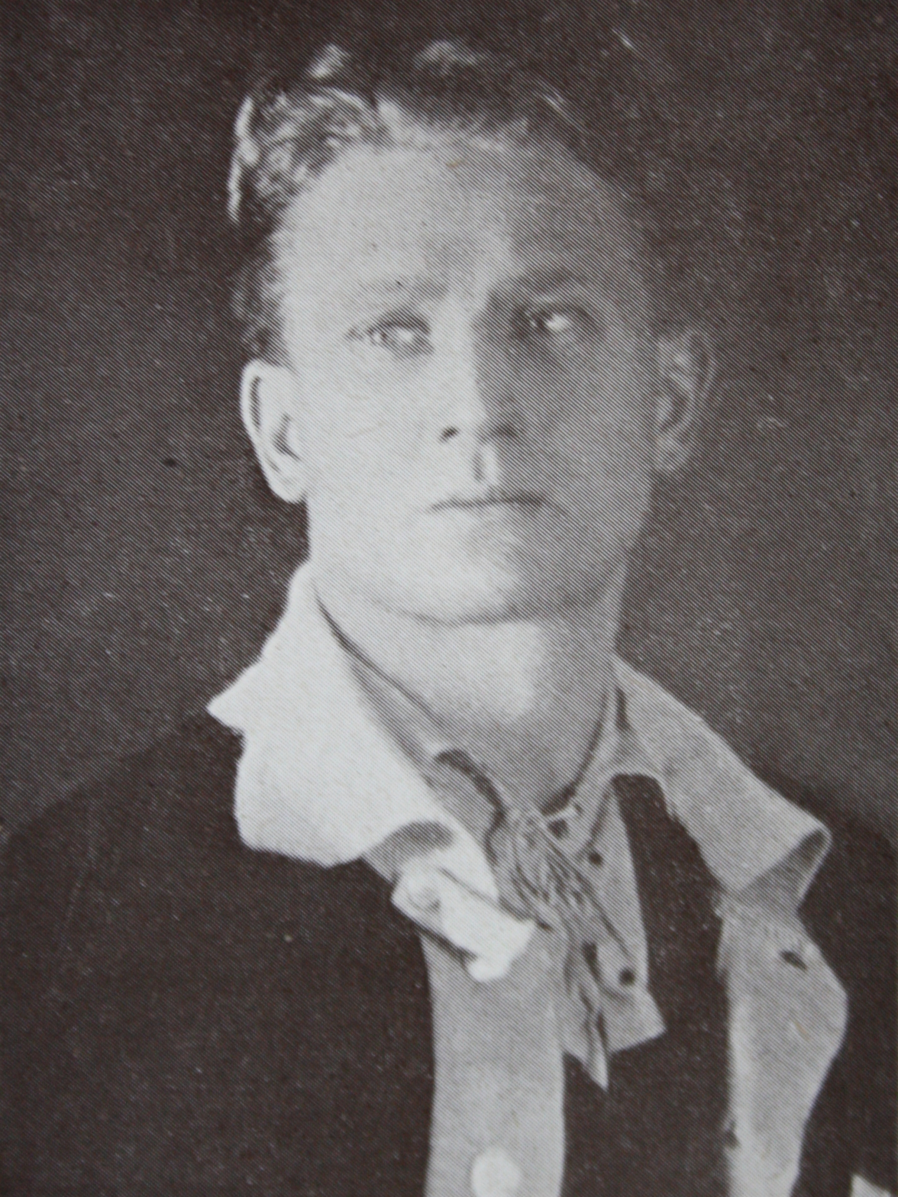 Karel Pešek-Káďa